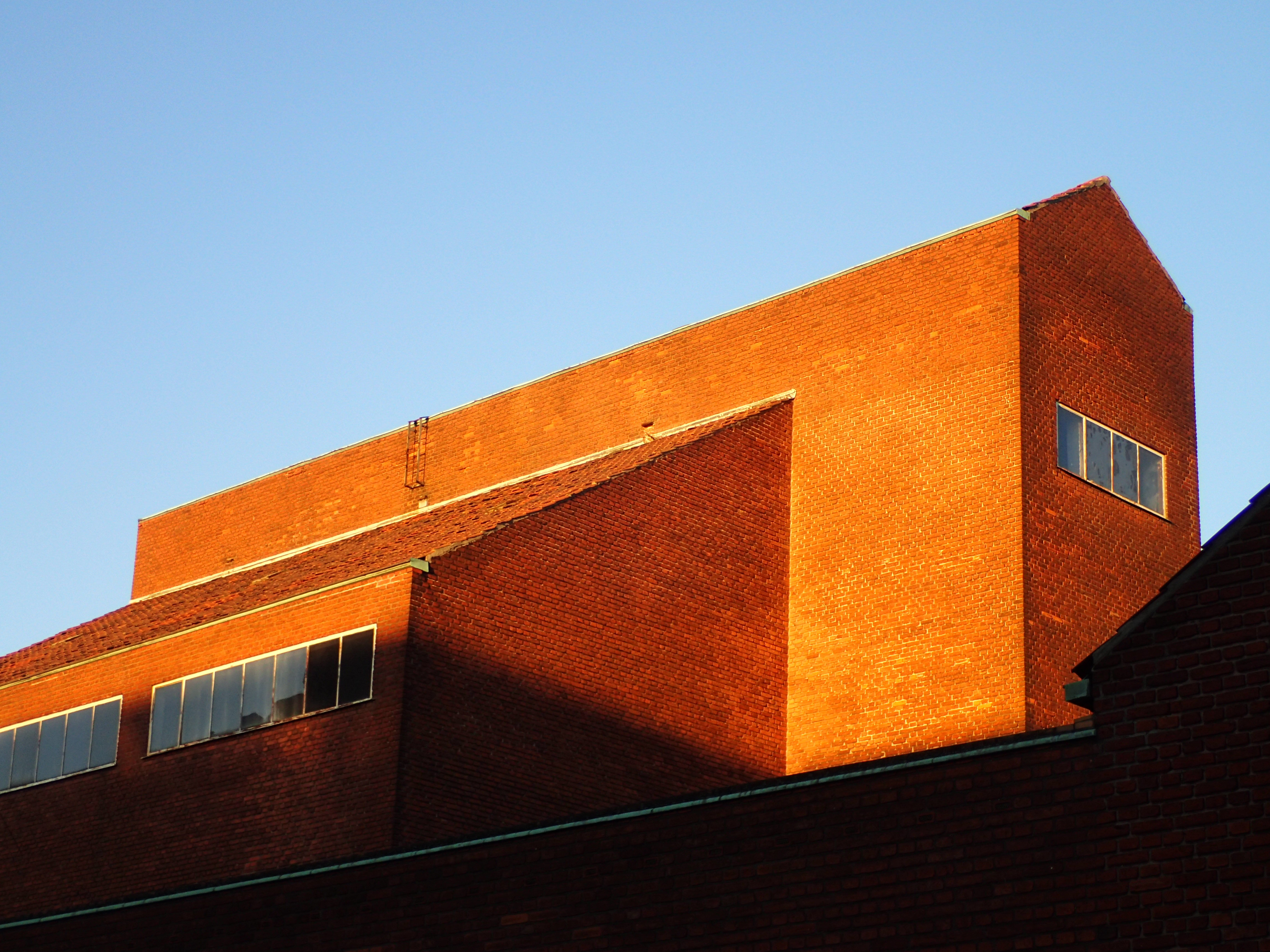 Århus Kommunehospital, Kedelhuset med Teknisk Afdeling og laboratorier. Færdigt i 1935.